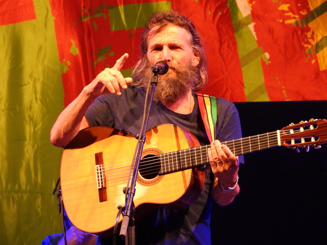 Hans SöllnerDepicted person: Hans Söllner – German singer-songwriter